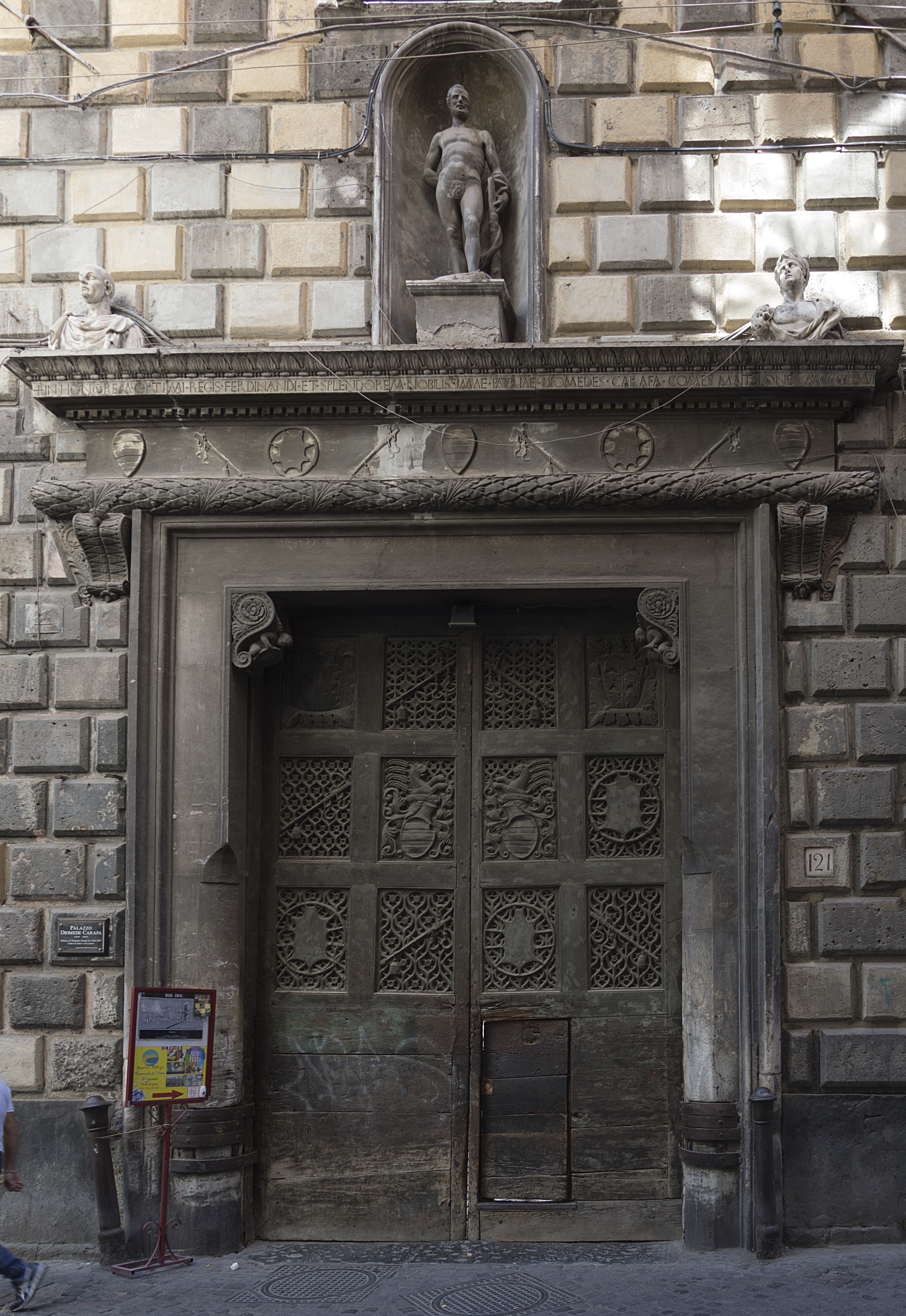 Portale quattrocentesco IN HONOREM OPTIMI REGIS FERDINANDI ET SPLENDOREM NOBILISSIMAE PATRIAE DIOMEDES CARAFA COMES MATALONE MCCCCLXVI ["In onore dell'ottimo re Ferrante (d'Aragona) e per lo splendore della nobilissima patria, Diomede Carafa conte di Maddaloni 1466]